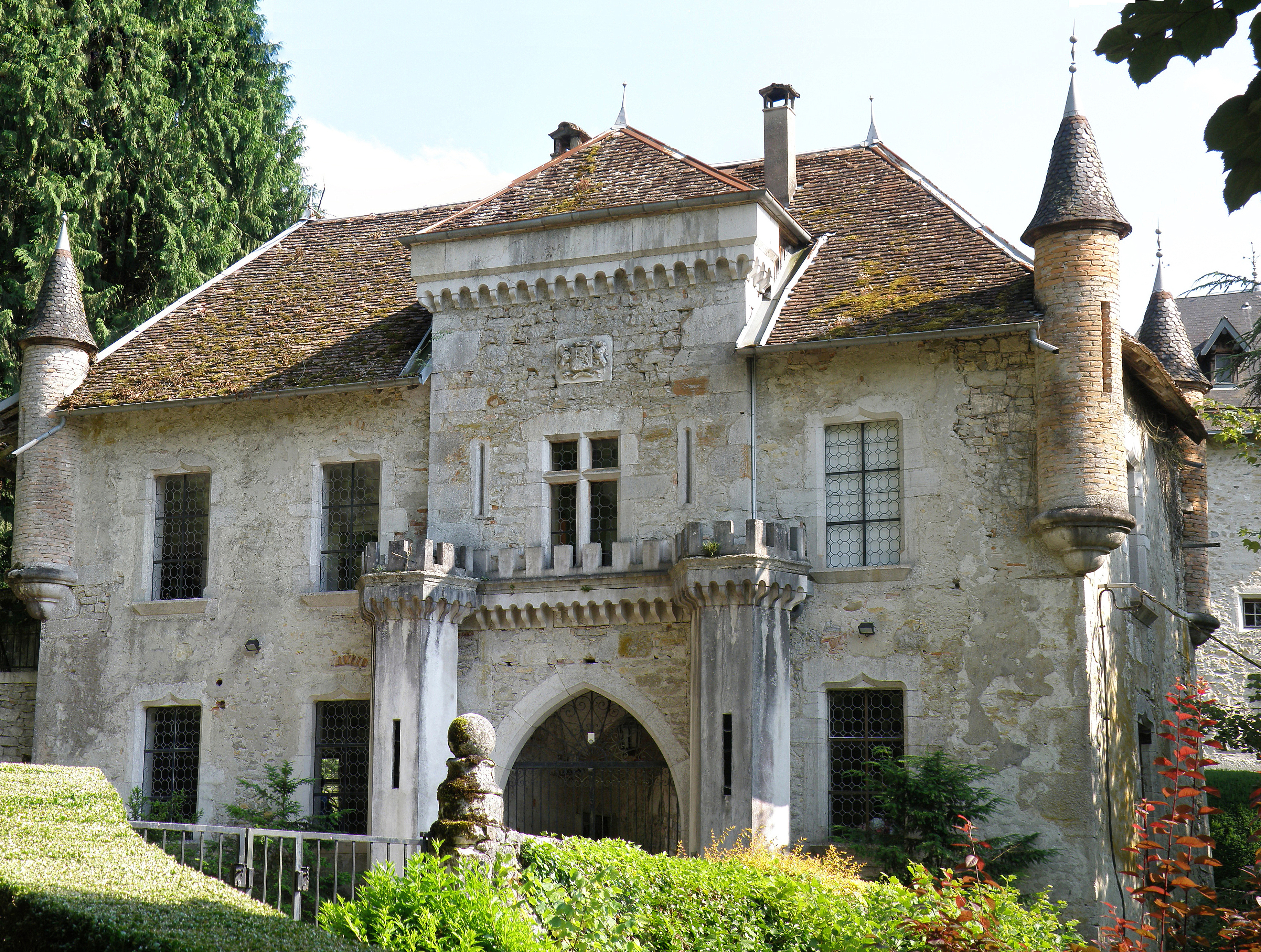 Lucey, comm. du département de la Savoie (région Rhônes-Alpes, France). Château, porche d'entrée.